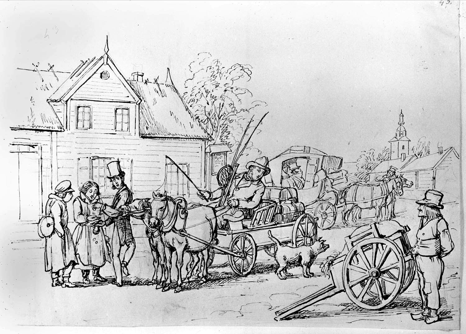 Exteriörmiljö från ett halländskt gästgiveri, till vänster: en betalande resenär. Teckning av Fr. v. Dardel (1817-1901) ur: "Mrs. Black&Smith. En route pour la Scandinavie". Handskrift. Äg.löjtn Thure Boltenstern.